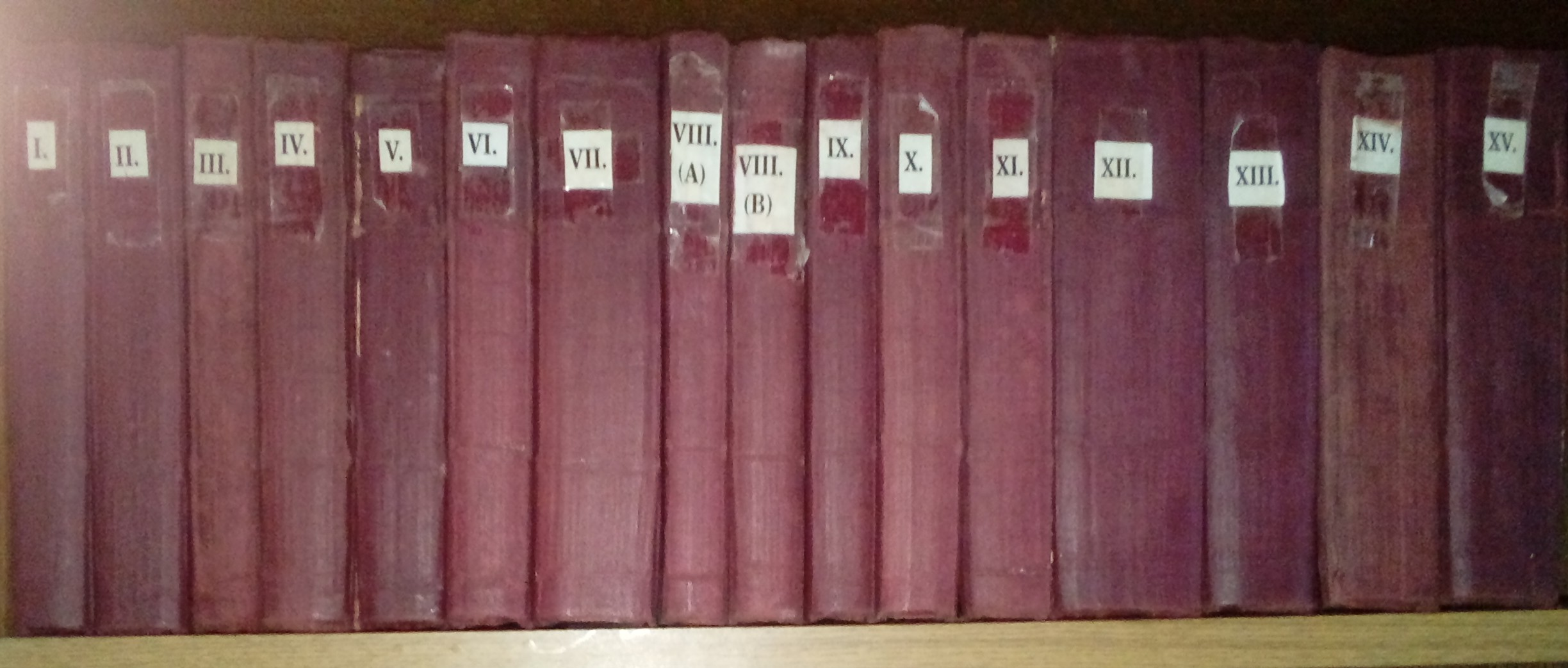 Cantu Caesar-féle VilágtörténelemA Hungarian translation? of the 'Storia universale' by C. Cantu, origin date between 1840 and 1847